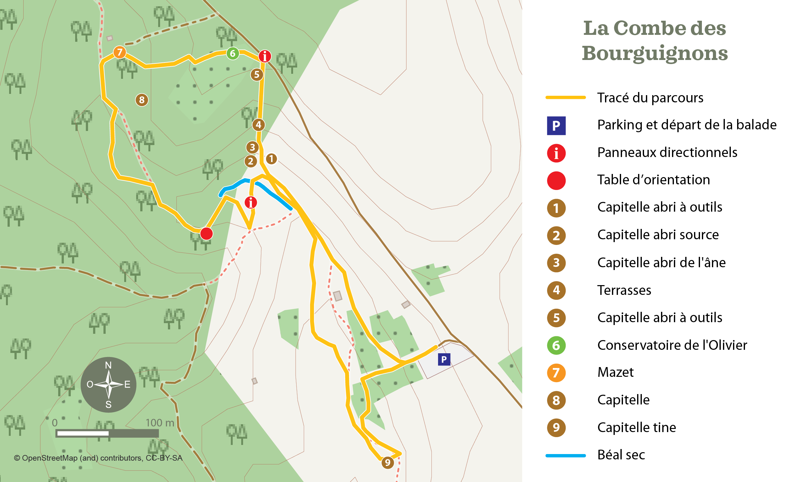 Carte de la Combe des Bourguignons à Marguerittes